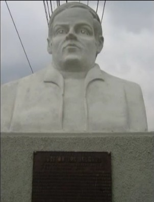 Busto de Jose Matias Delgado